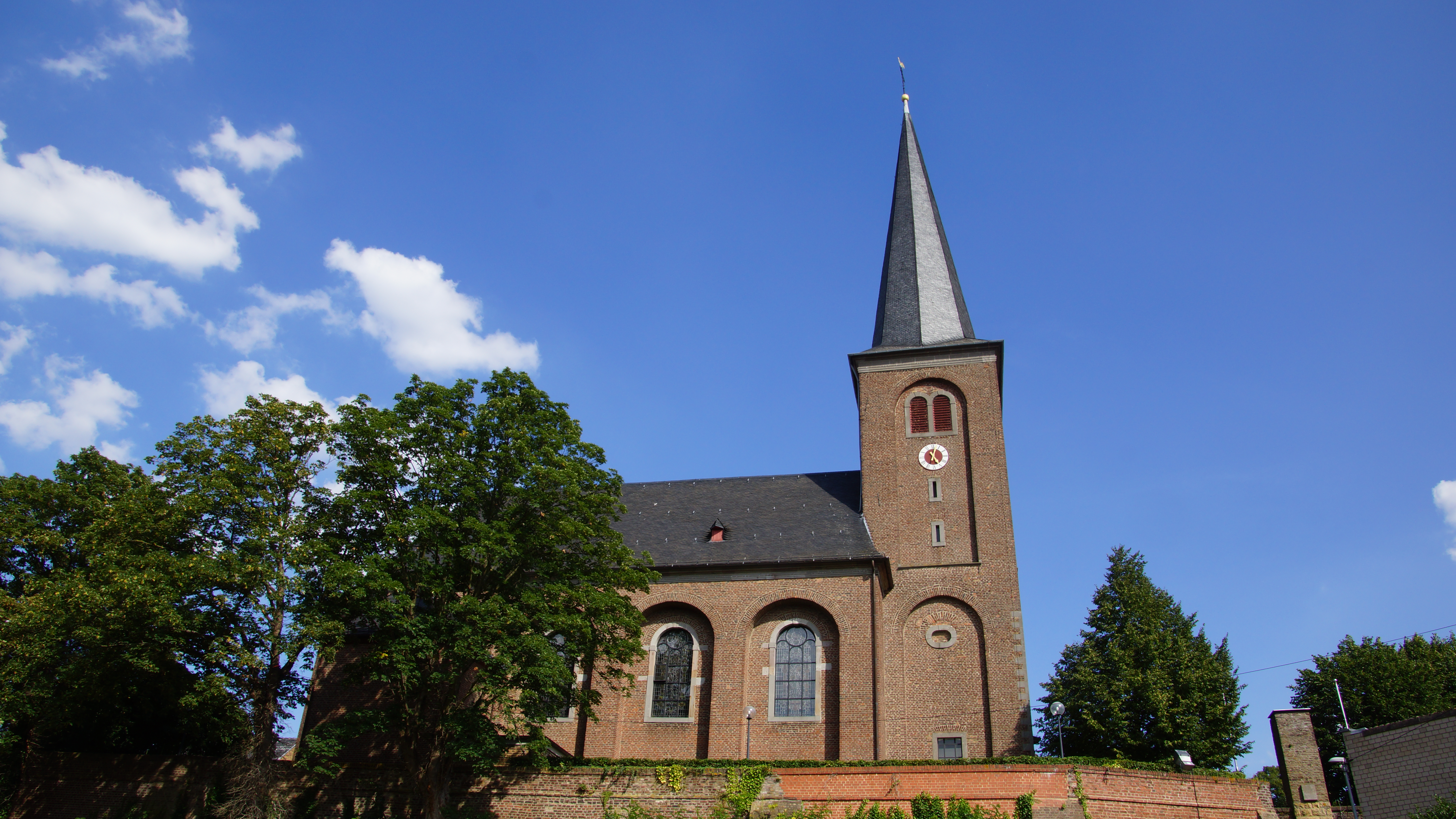 Heilig-Kreuz-Kirche Vernich, Trierer Straße